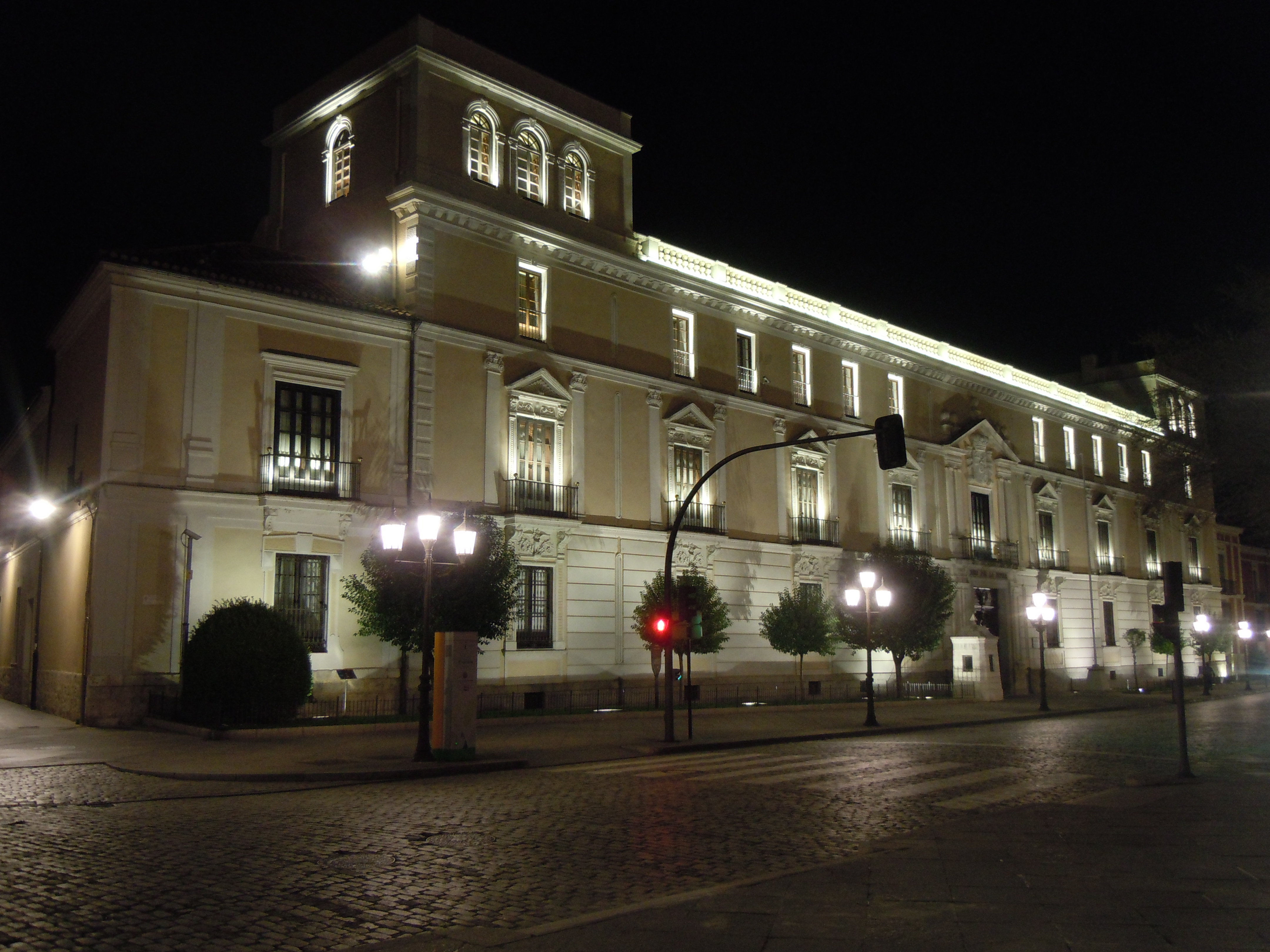 Palacio Real, Valladolid (Spain).